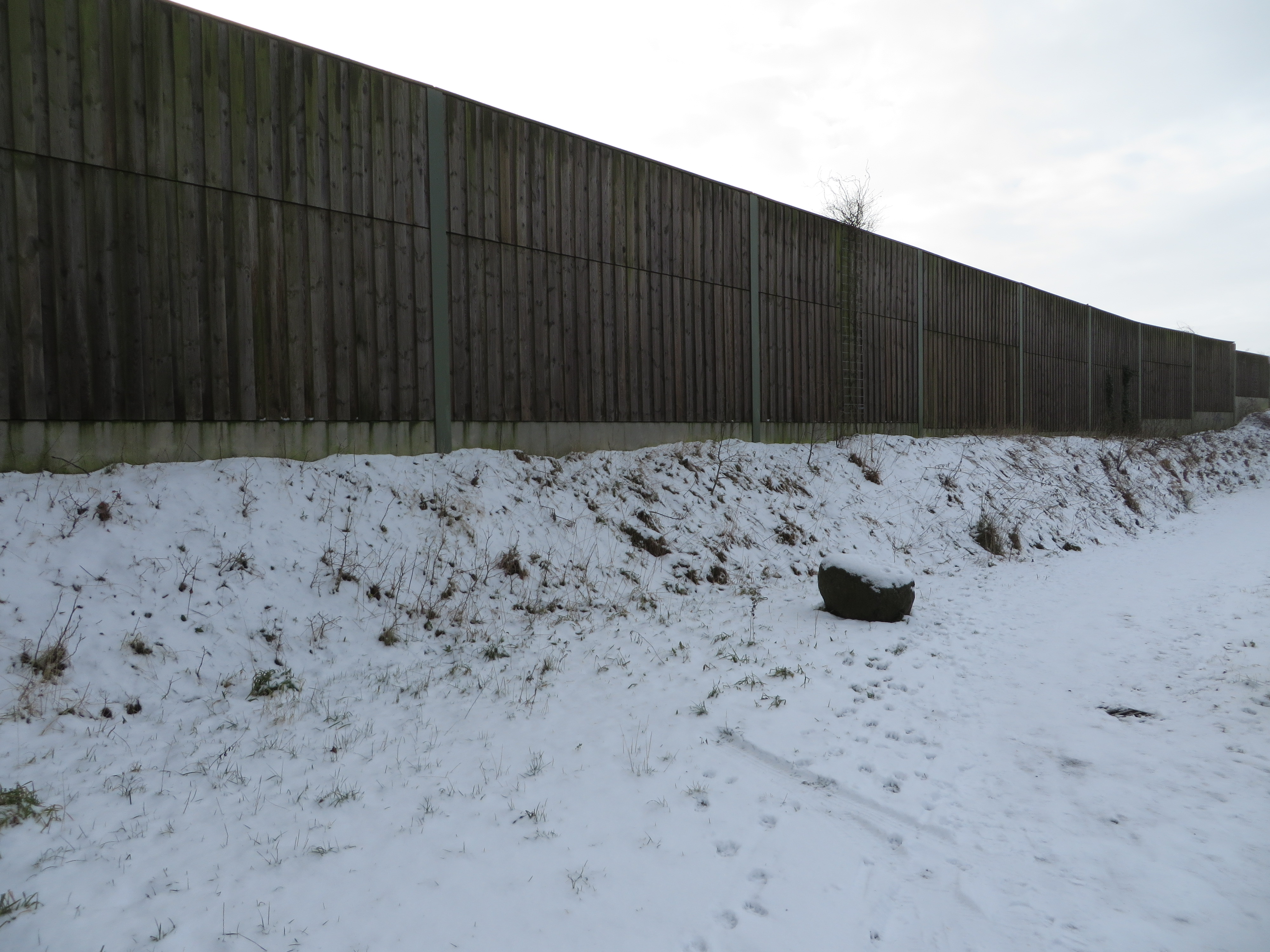 Schallschutz an der Nordstraße bei Engelsby-Dorf 18